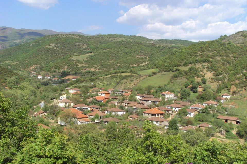 Bašobos, Macedonia